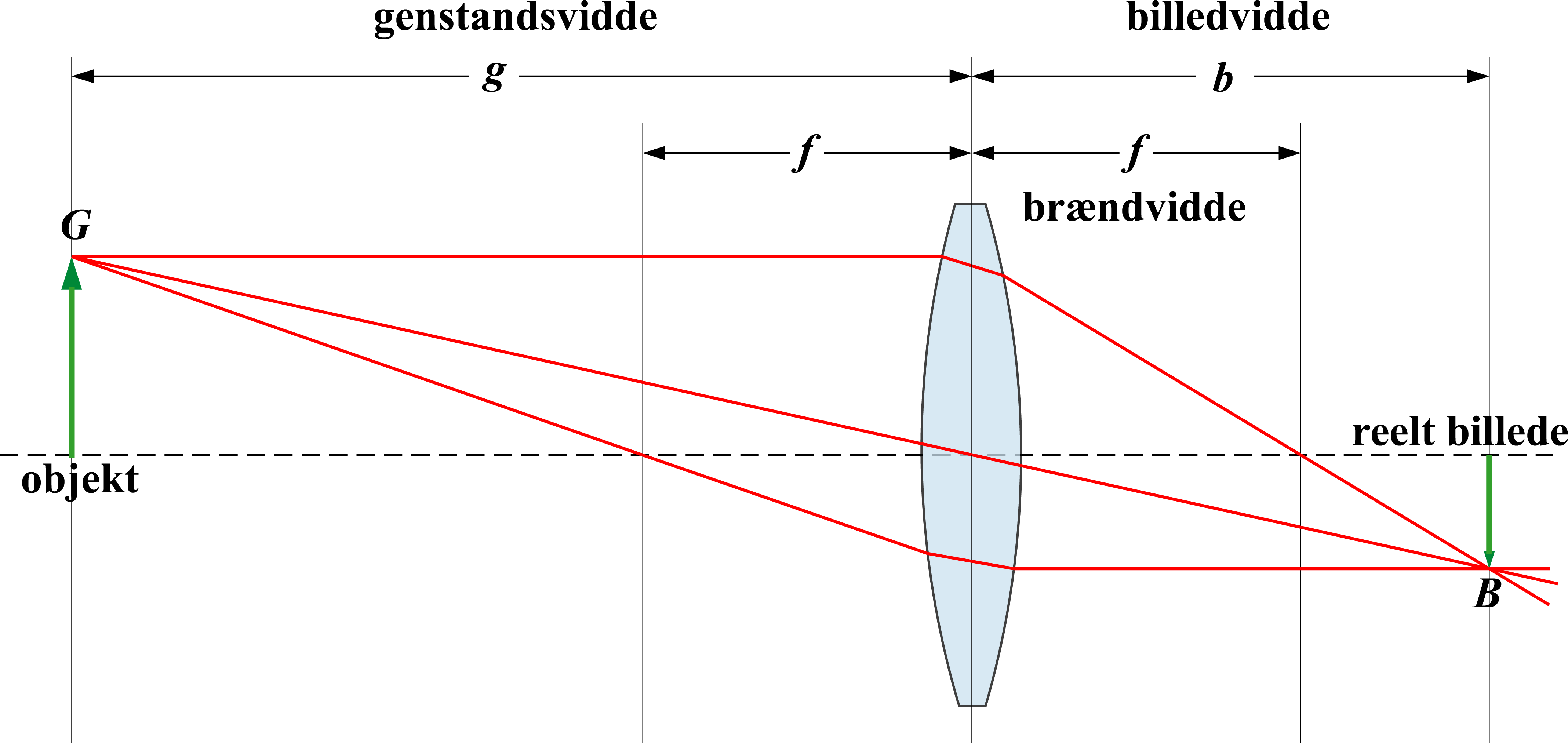 Skitse af billeddannelse med en samlelinsen. Se også Linseformlen.